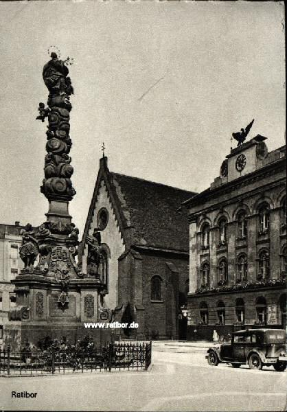 Widok z Rynku na dawny Ratusz